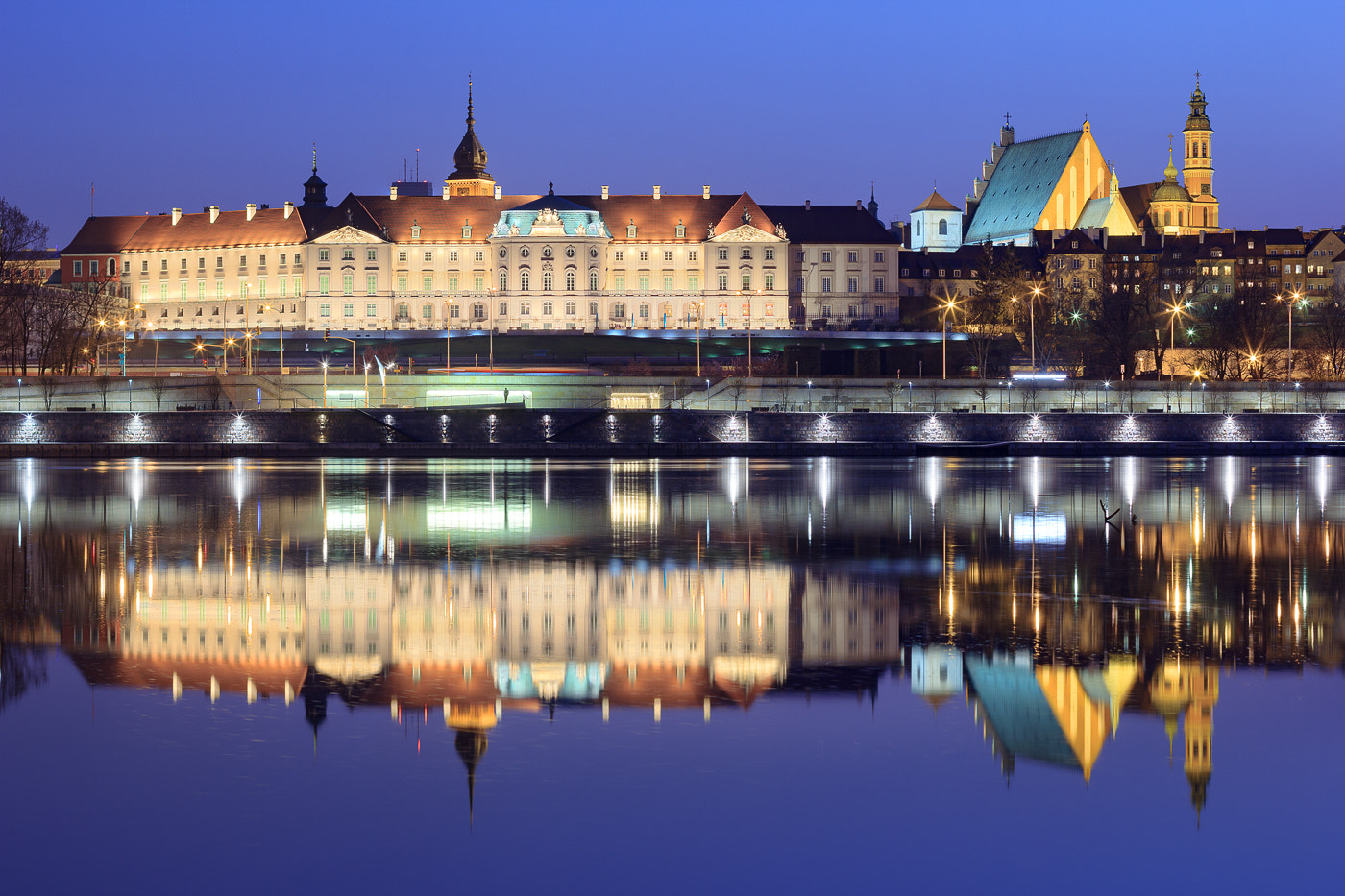 500px provided description: Zamek Kr?lewski w Warszawie Zdj?cie do wykorzystania komercyjnego i niekomercyjnego. Prosimy o oznaczenie HRS Poland jako autora zdj?cia. Na przyk?ad: ?r?d?o: ?r?d?o: HRS Poland - Warszawa Please tag HRS Poland as a source. For example: Source: HRS Poland - Warsaw [#warsaw ,#wisla ,#warszawa ,#starowka ,#zamek kr?lewski ,#zamek krolewski]